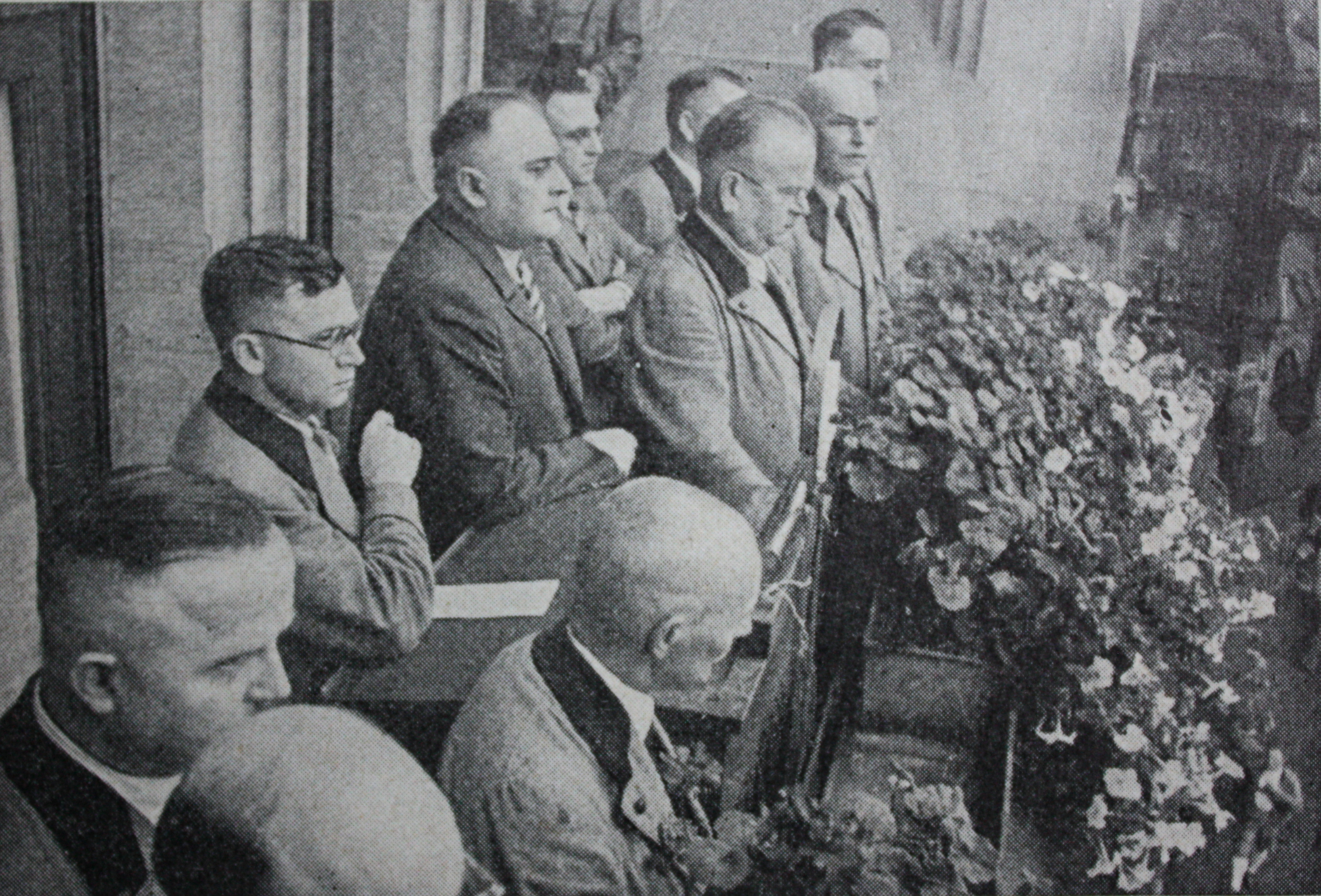 47. Deutscher Wandertag Stuttgart 1938 Originalbildbeschreibung: "Auf dem Balkon des Rathauses bei der Kundgebung. Von links nach rechts: 1. Reihe: Löscher, der Deutsche Wanderführer Min.-Präs. Dr. Werner, Höllwarth, Stadtrat Dr. Schwarz; 2. Reihe: Rödding, Fahrbach, Oberbürgermeister Dr. Strölin, Stadtrat Dr. Locher, Woesch"